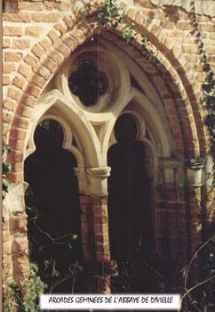 Arcades géminées de l'abbaye de Divielle, Goos (Landes) (photo Marc Lataste)